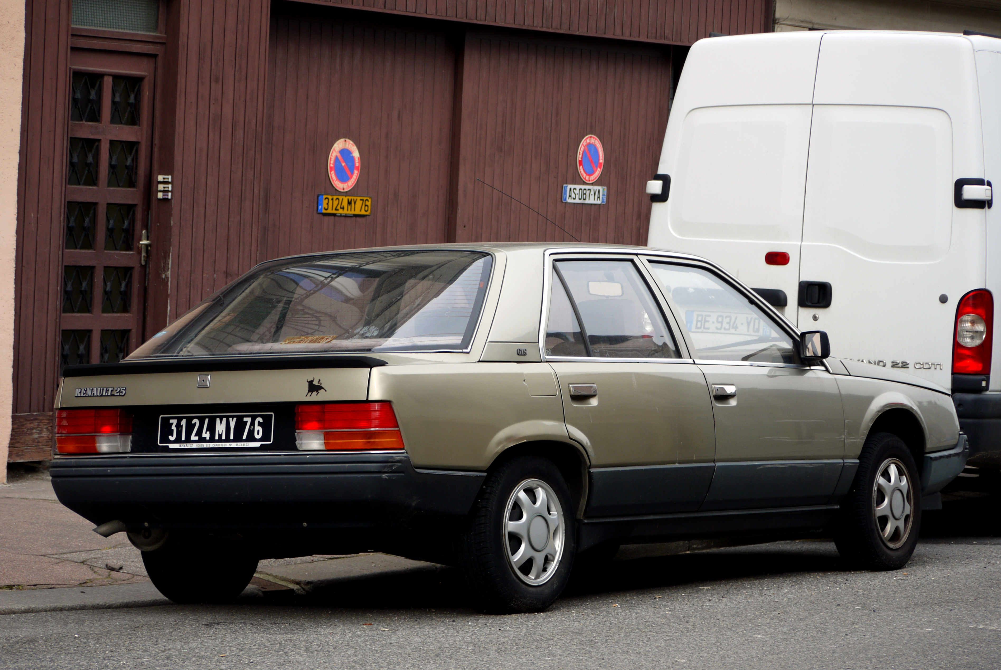 Renault 25 GTS phase I.